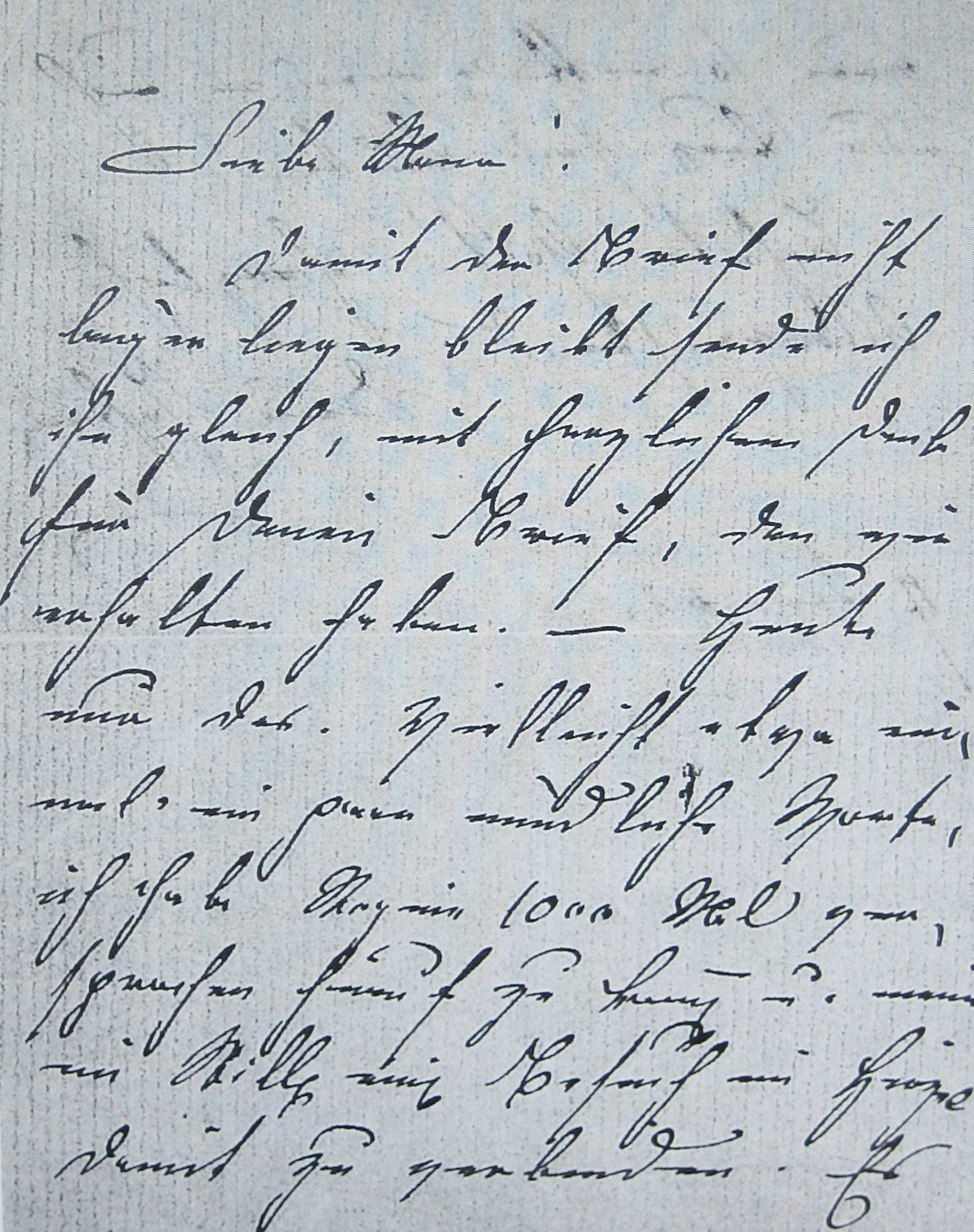 Handschrift Johanna Spyris; Anfang eines Briefes an ihre Mutter